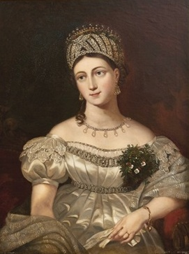 Luísa de Saxe-Gota-Altenburgo